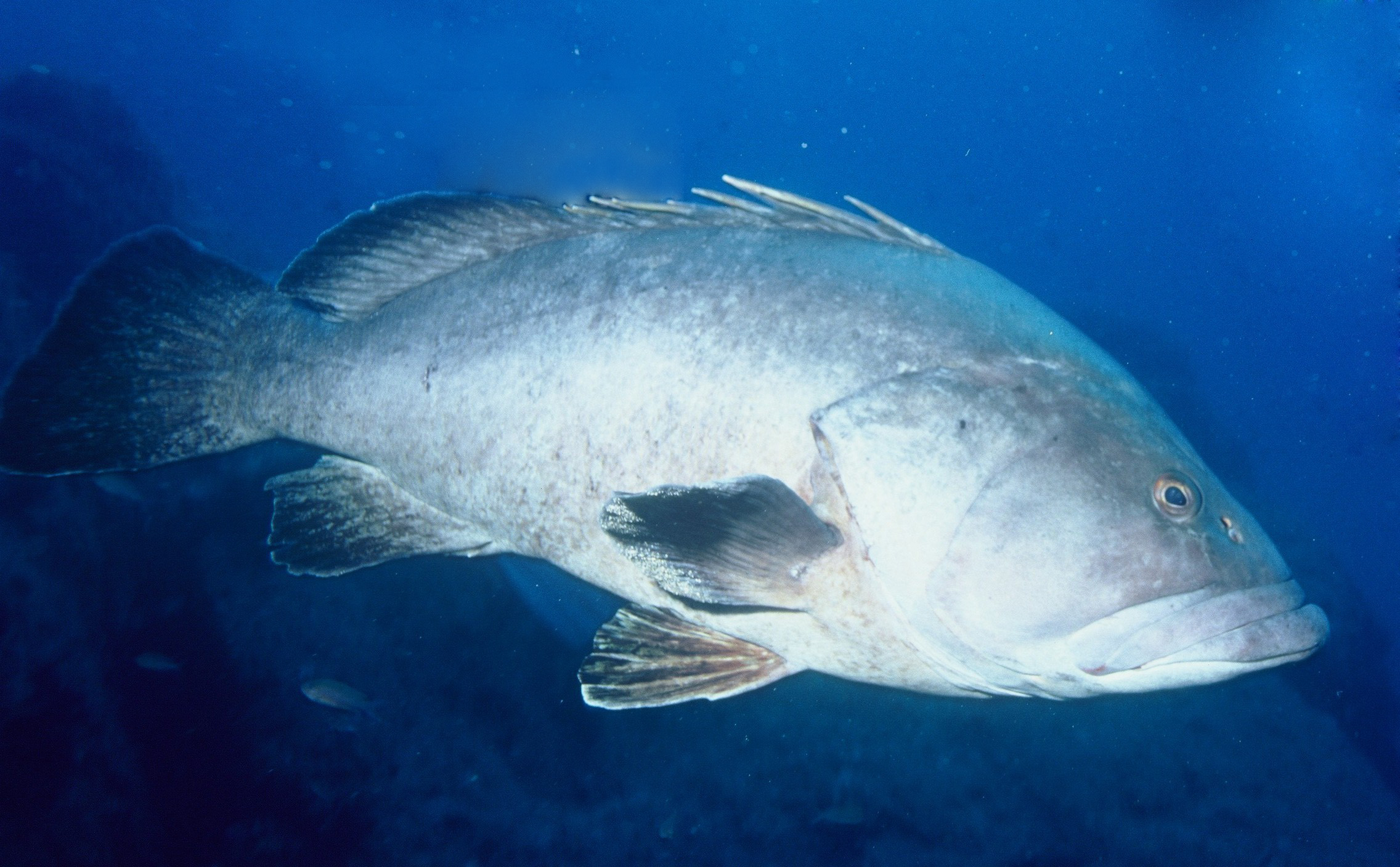 Epinephelus marginatus, Synonym: Epinephelus guaza